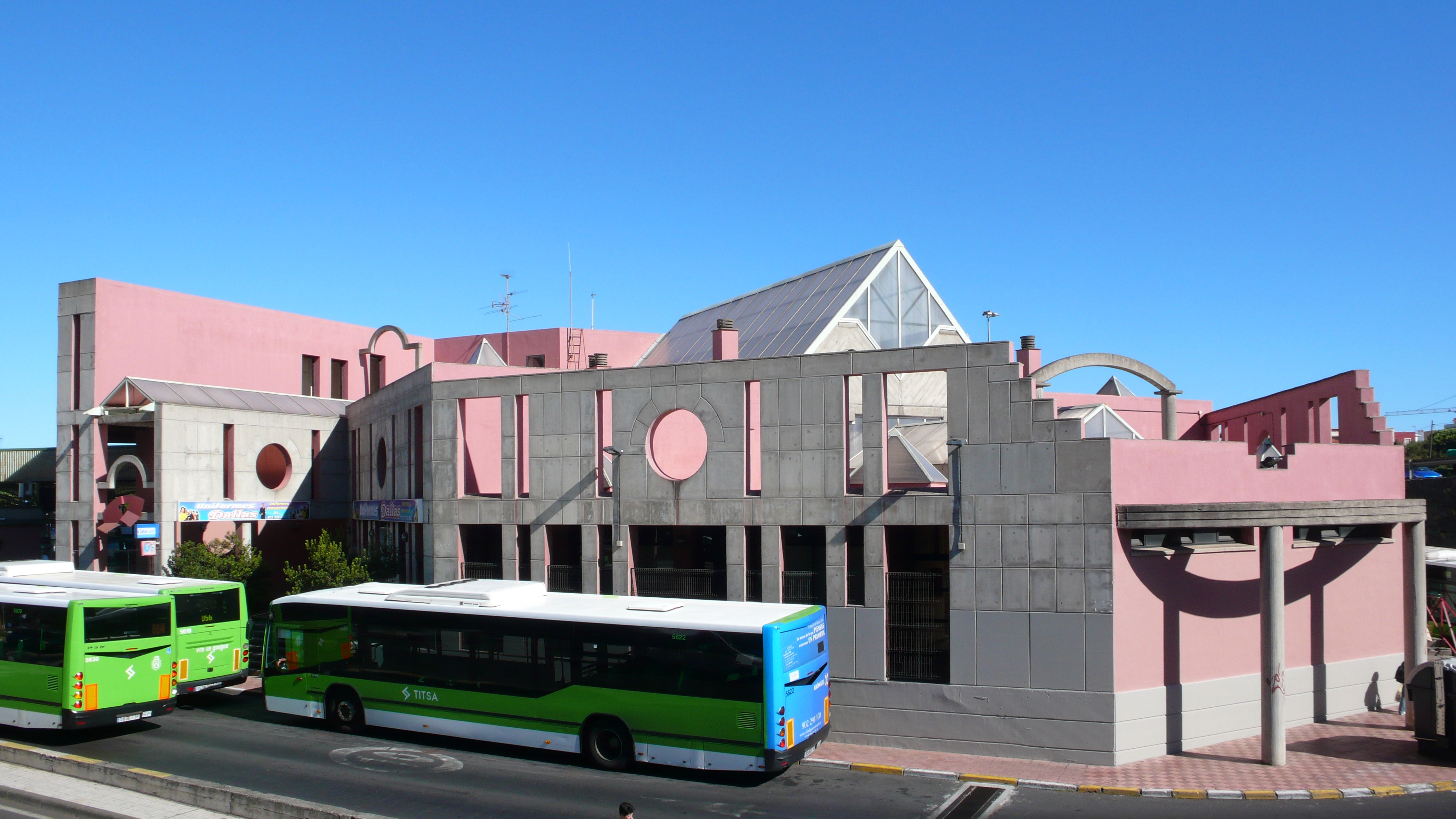 Estación de guaguas de La Laguna. Zona de San Benito. Fachada Noroeste.